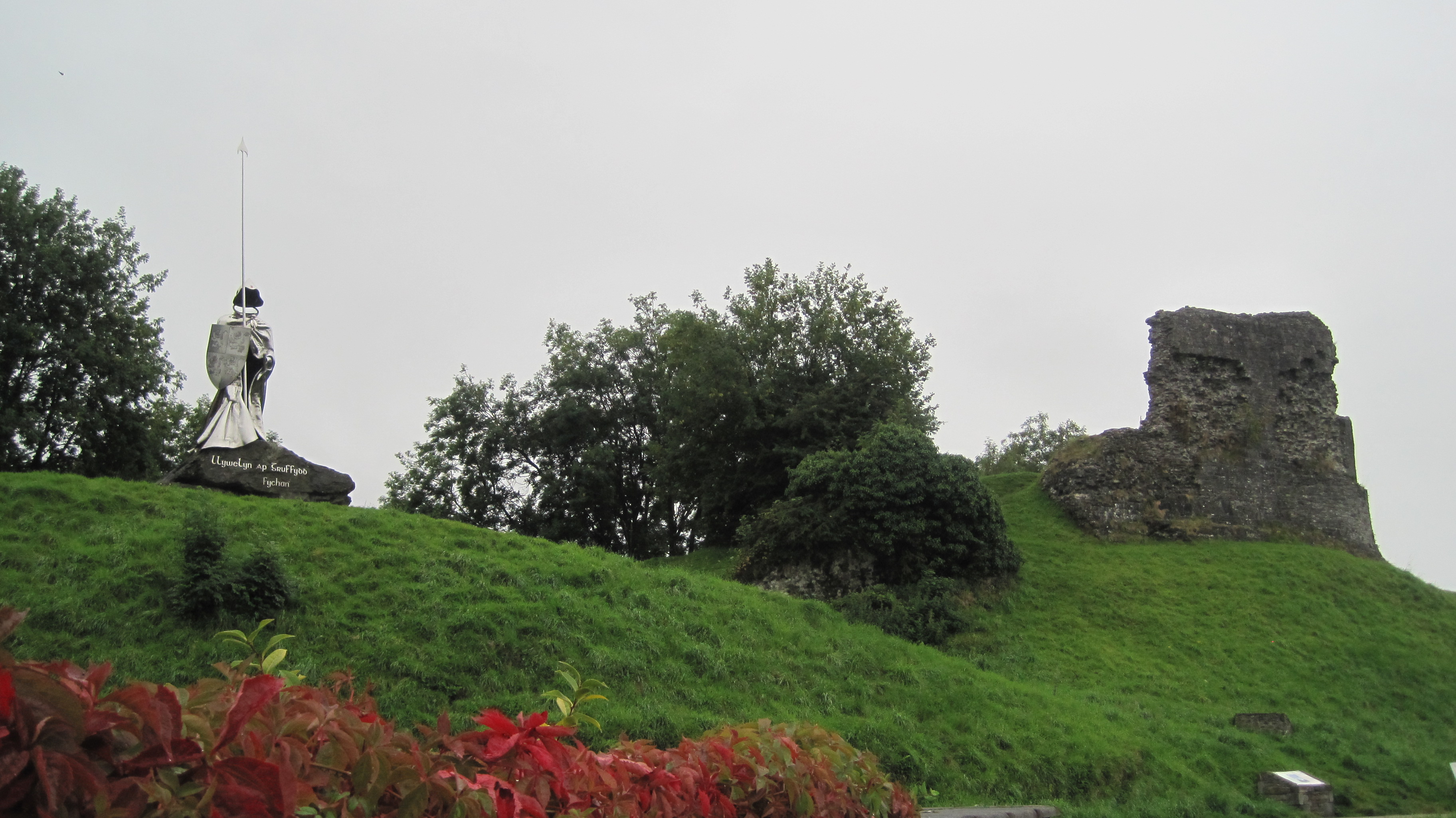 Castell Llanymddyfri, Sir Gaerfyrddin; sculpture of LLywelyn ap Gruffydd Fychan, Welsh Prince.